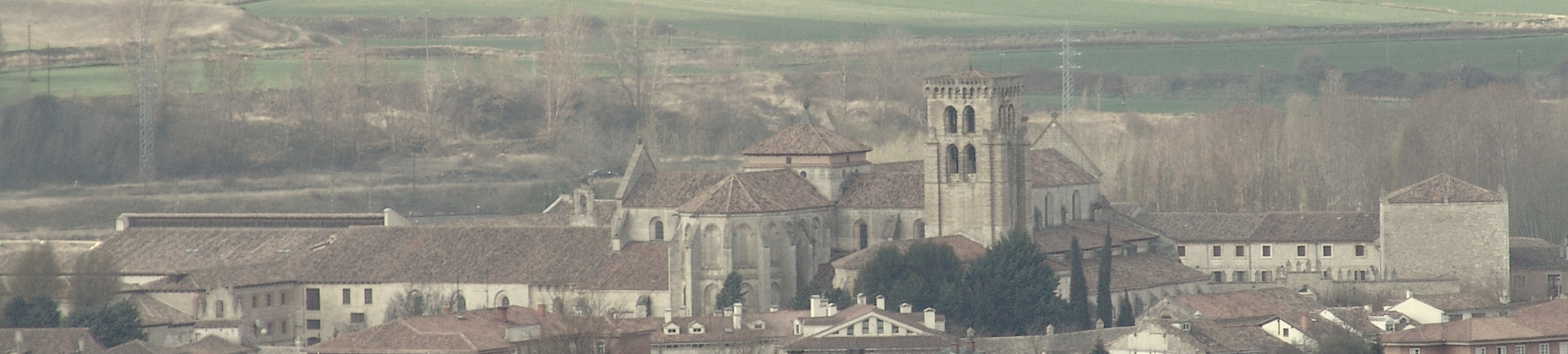 Panotrámica del Compás de Huelgas, vista desde el Castillo, Burgos, España